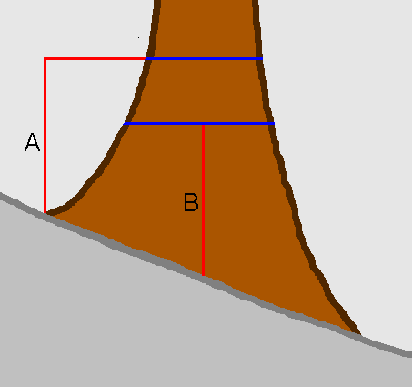 Brusthöhendurchmesser an der Hangoberseite und alternative Umfangsmessung bei besonders dicken Bäumen ab etwa 1,5 Meter Durchmesser.